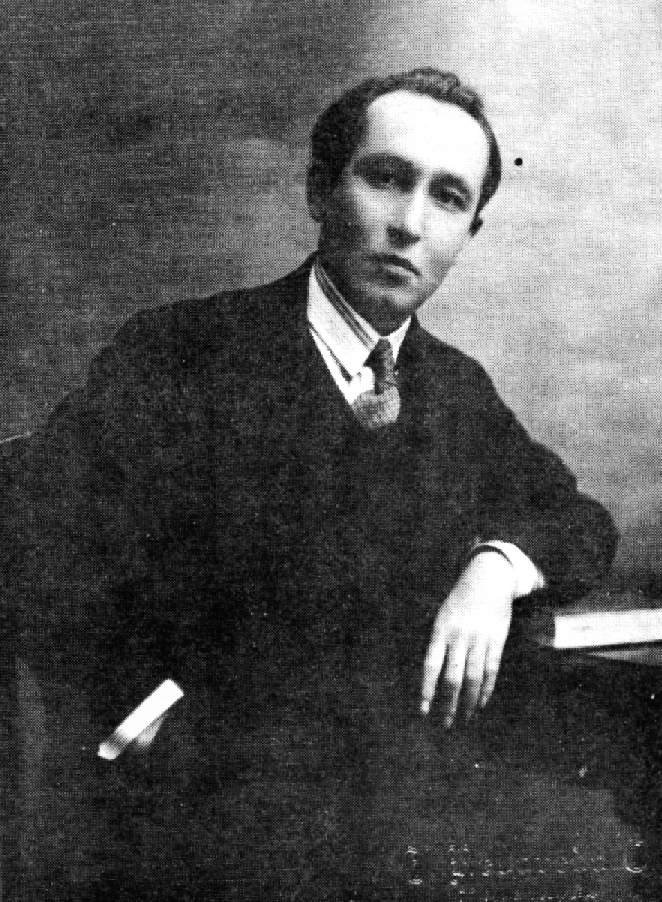 Antenor Orrego (1892-1960) filósofo, ensayista, político y pensador peruano.